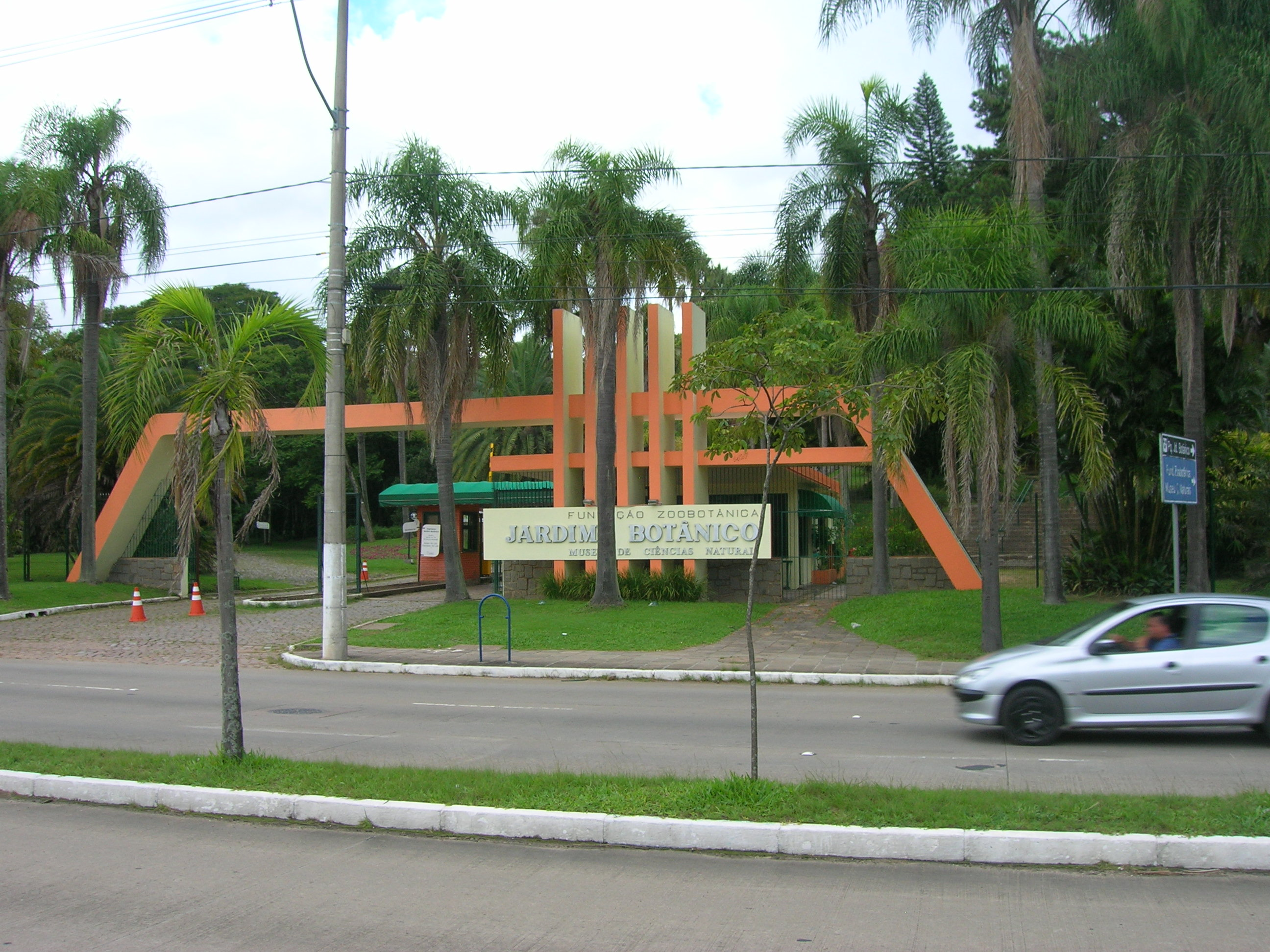 O pórtico do Jardim Botânico de Porto Alegre.